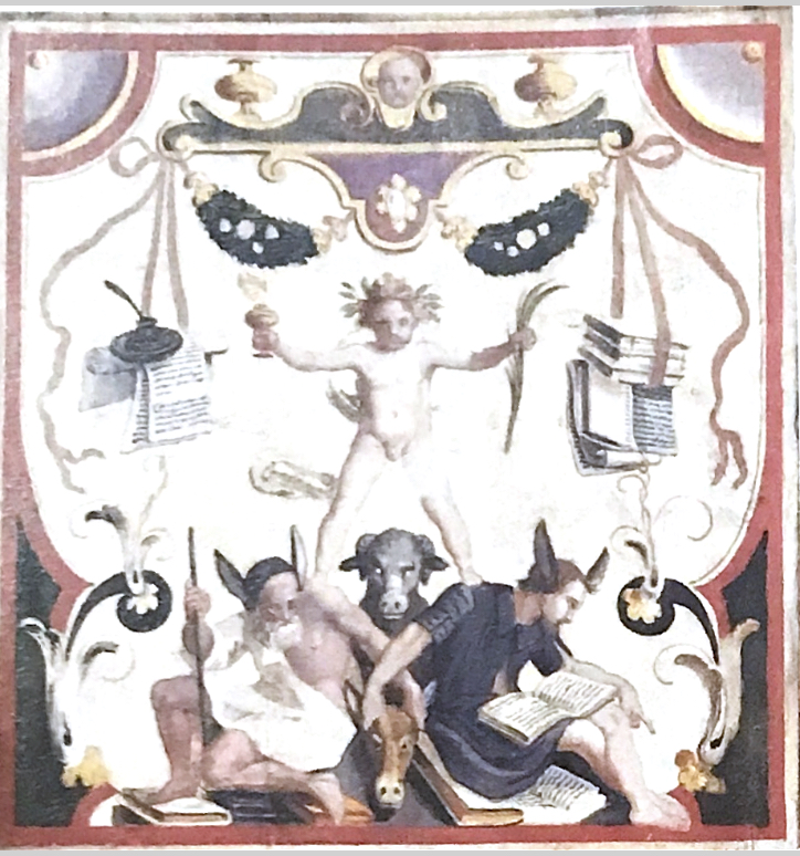 cassettone degli artisti